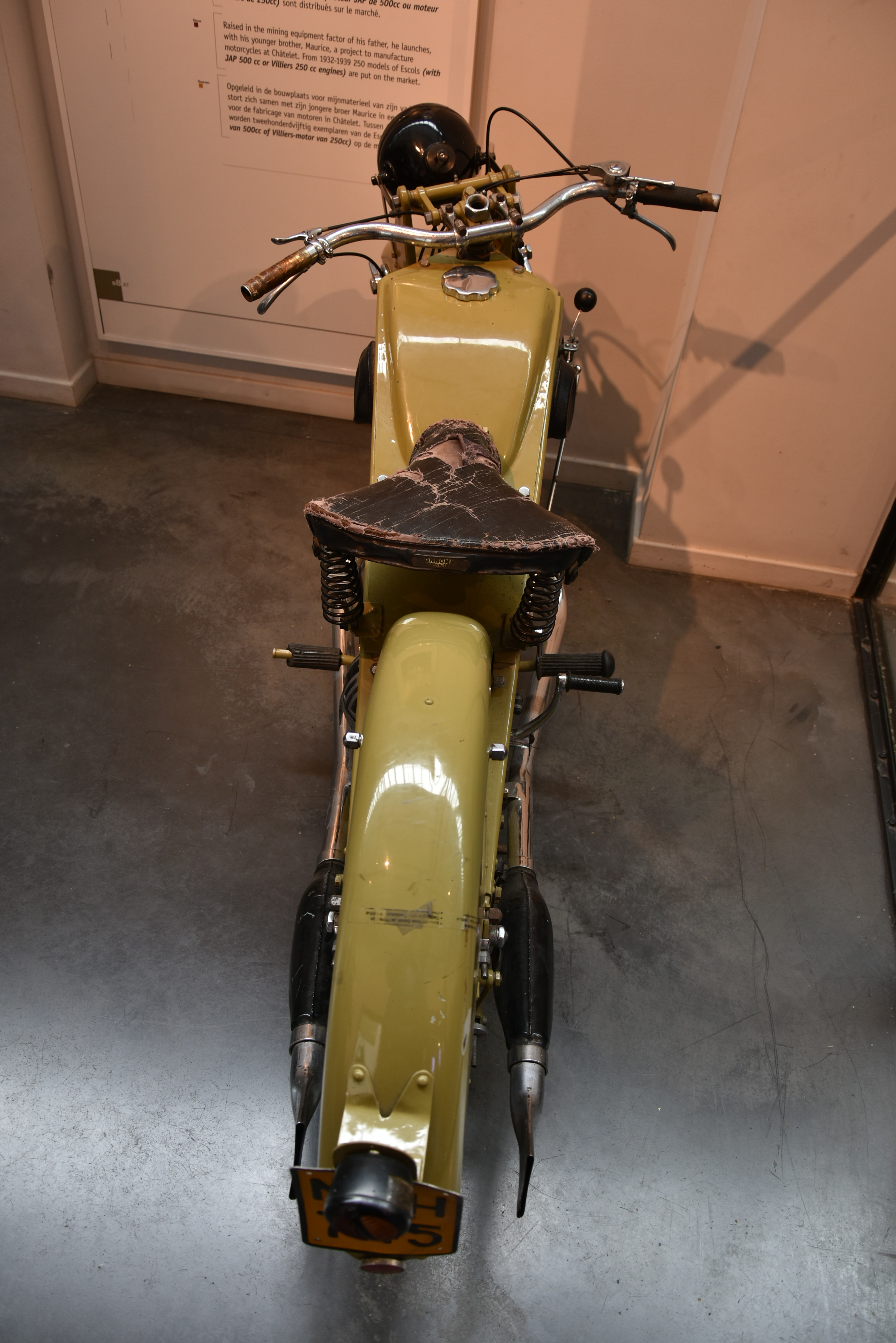 Motorfiets Escol Bois du Cazier - Marcinelle 7-10-2018 This photo of movable heritage has been taken in the Walloon Region